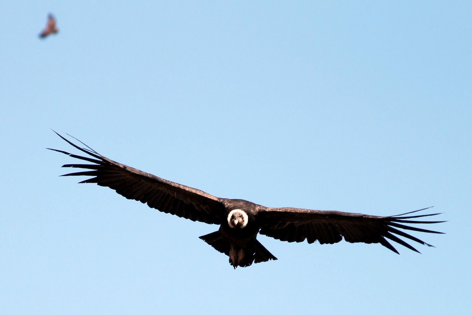 Vultur gryphus, llamado comúnmente cóndor andino, cóndor de los Andes, o simplemente cóndor (del quechua kuntur) es una especie de la familia Cathartidae del orden de aves accipitriformes. Habita en Sudamérica, en la cordillera de los Andes, cordilleras próximas a ella, sierras del centro de la Argentina, y en las costas adyacentes de los océanos Pacífico y Atlántico. Es el ave no marina de mayor envergadura del Planeta